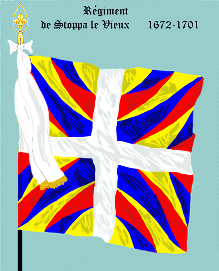 Ordonnanzfahne eines Fremdenregiments im königlich französischen Dienst. (Schweizer Regiment) - Entnommen und überarbeitet aus: „LES UNIFORMES ET LES DRAPEAUX DE L'ARMÉE DU ROI“ Marseille 1899. - Drapeau d'Ordonnance d' un régiment étranger au service française (régiment suisse.)